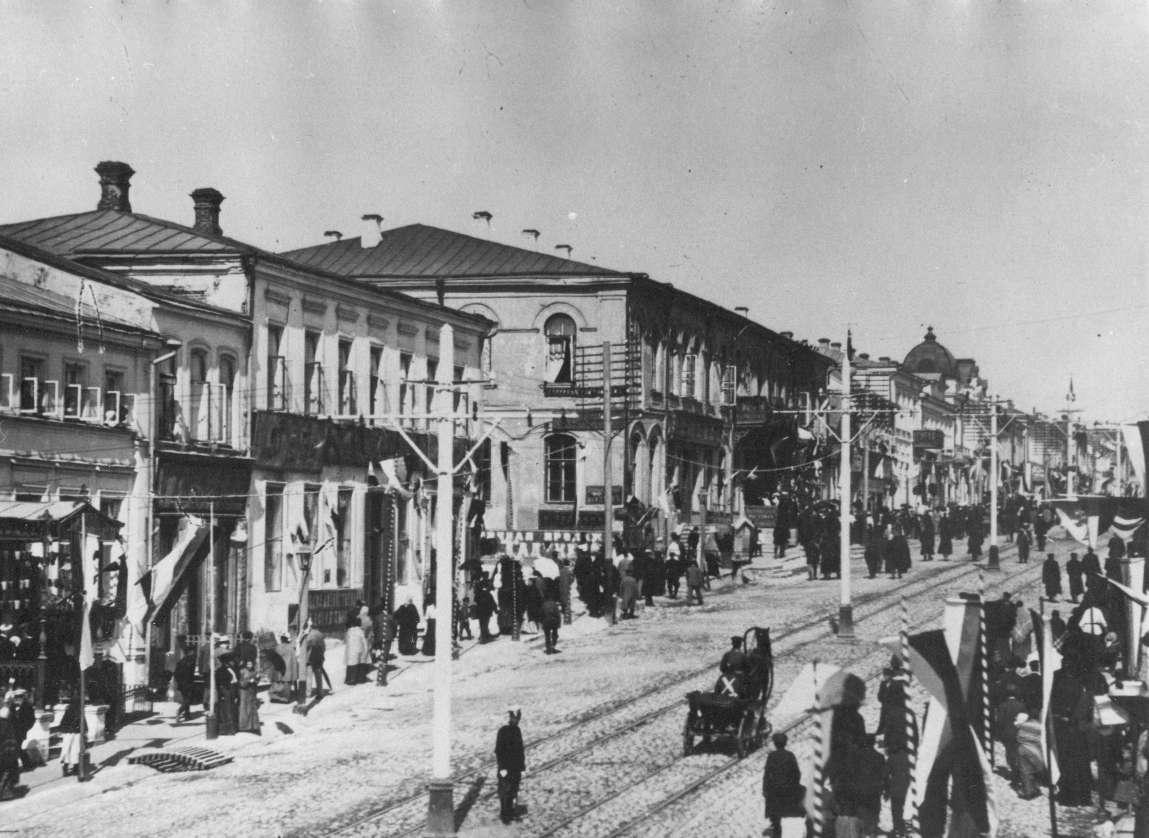 Bolkhovskaya street (present Lenina street) in Oryol. 1900s or 1910s